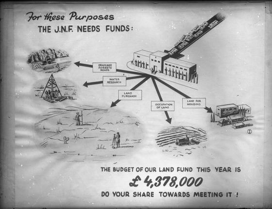 חומר למפעלים - בשביל הלשכות.